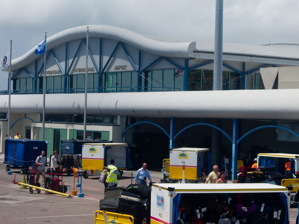 Provo Airport